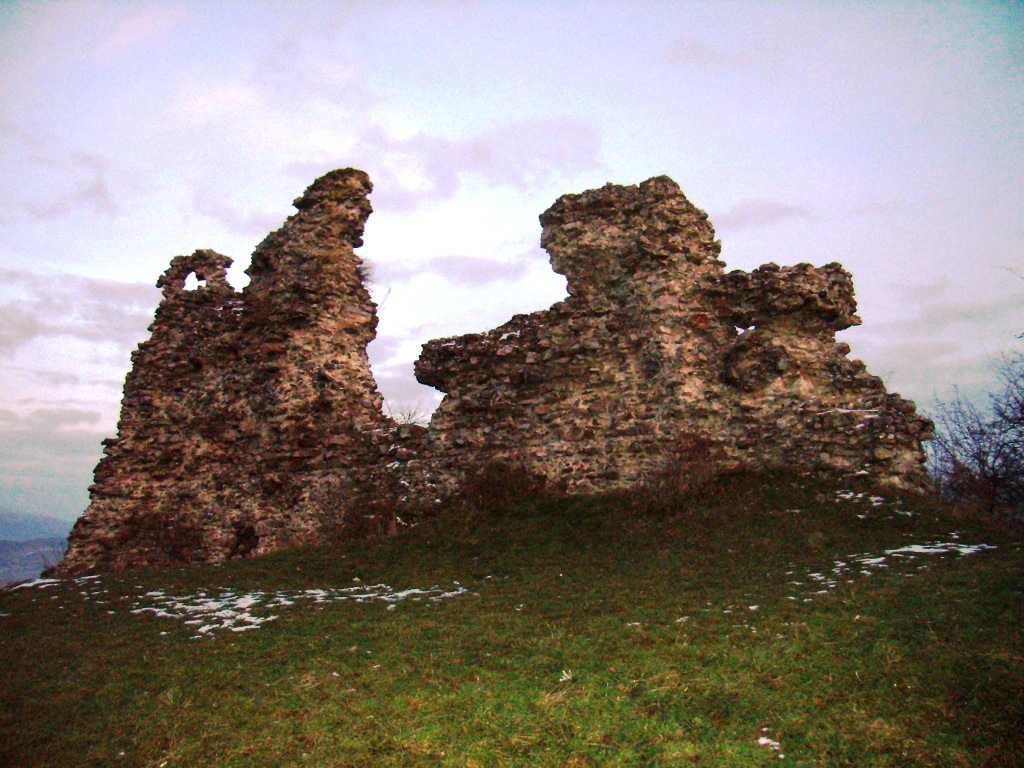 Замок (мур.), смт.Королеве